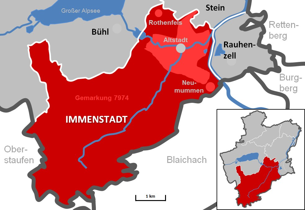 Immenstadt Gemarkung 7974 Altstadt (erstellt mit MS-Excel)